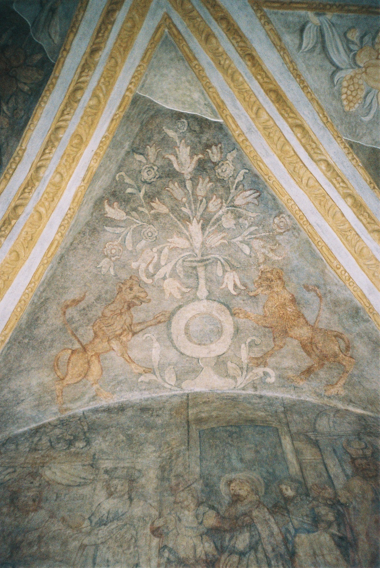 kamienica Gruszewiczów - wnętrze 13